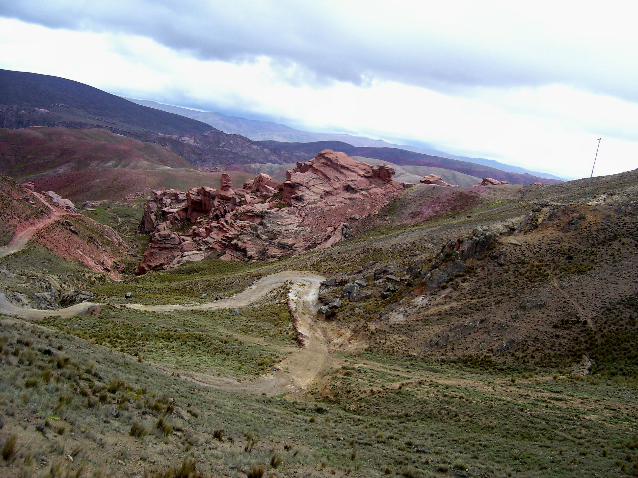 Puna en Talija, Cochabamba, Bolivia